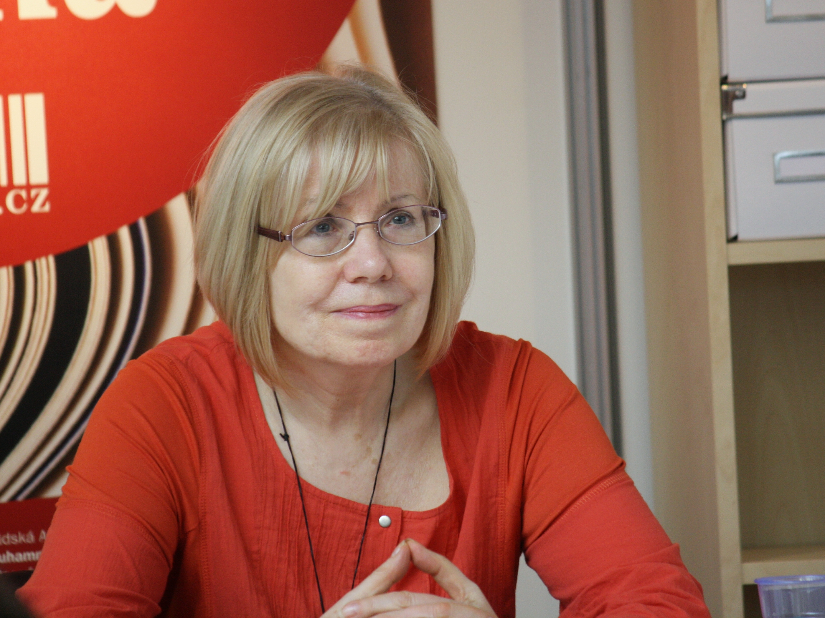 Daniela Fischerová na 17. mezinárodním knižním veletrhu Svět knihy v Praze Personality rights warningAlthough this work is freely licensed or in the public domain, the person(s) shown may have rights that legally restrict certain re-uses unless those depicted consent to such uses. In these cases, a model release or other evidence of consent could protect you from infringement claims.